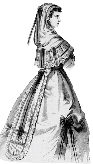 Косынка с капюшоном. Фасон «Мария-Антуанетта» (Модный магазин № 8, 1868 год)